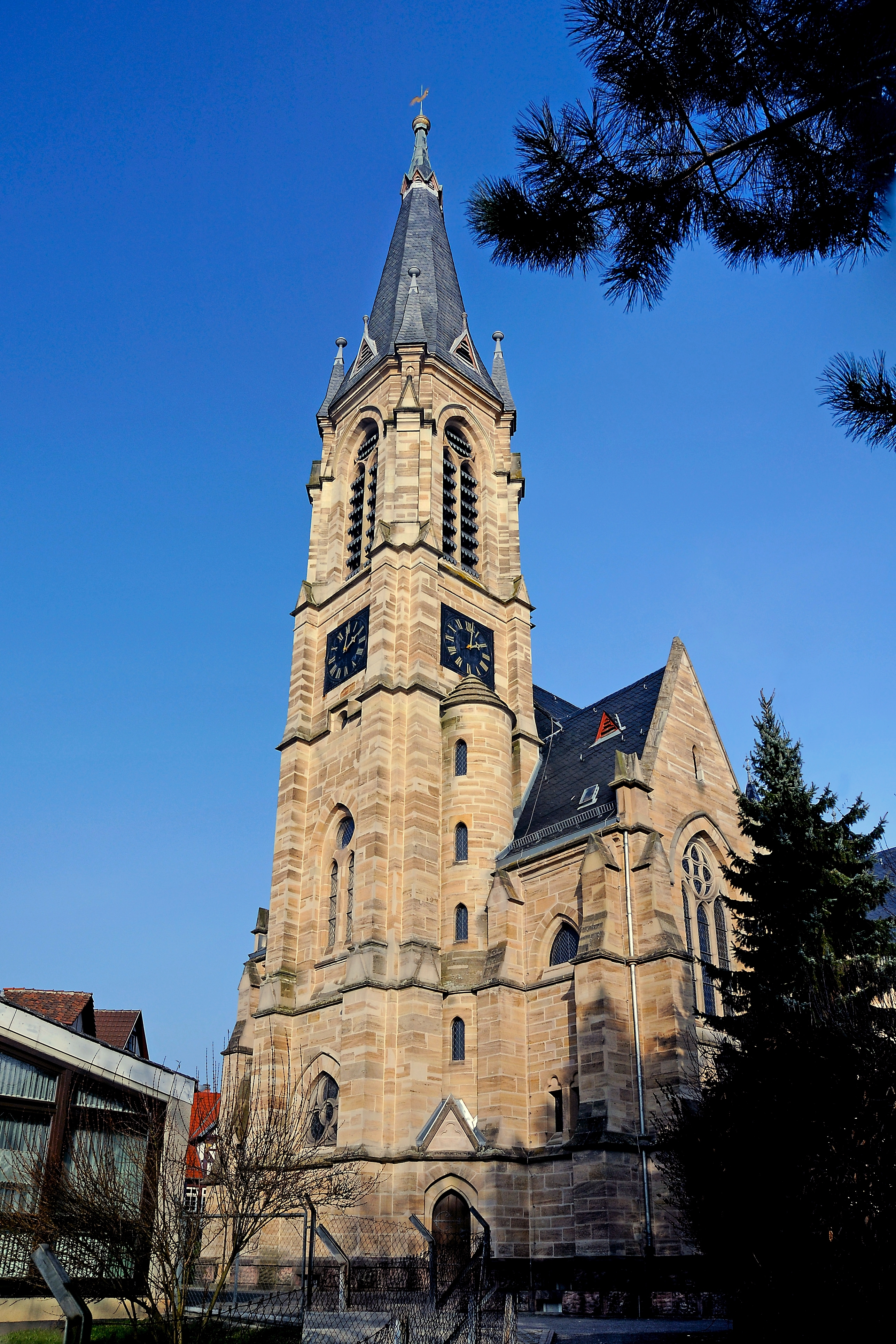 ev. Stadtkirche Wanfried, Turm von Süd/West